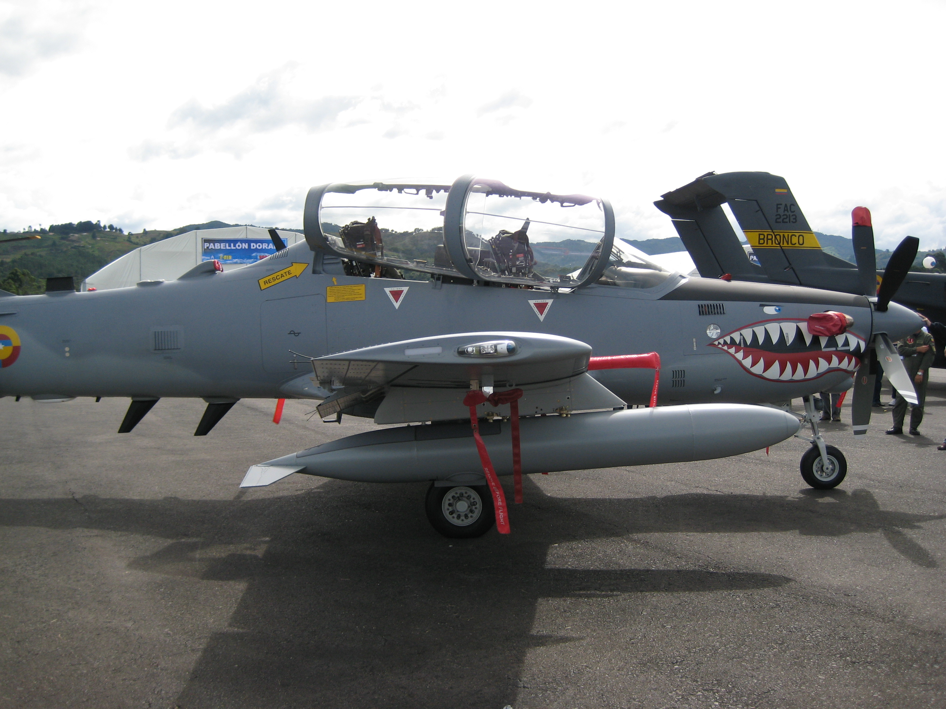 A-29 Supertucano de la Fuerza Aérea Colombiana durante F-Air 2008